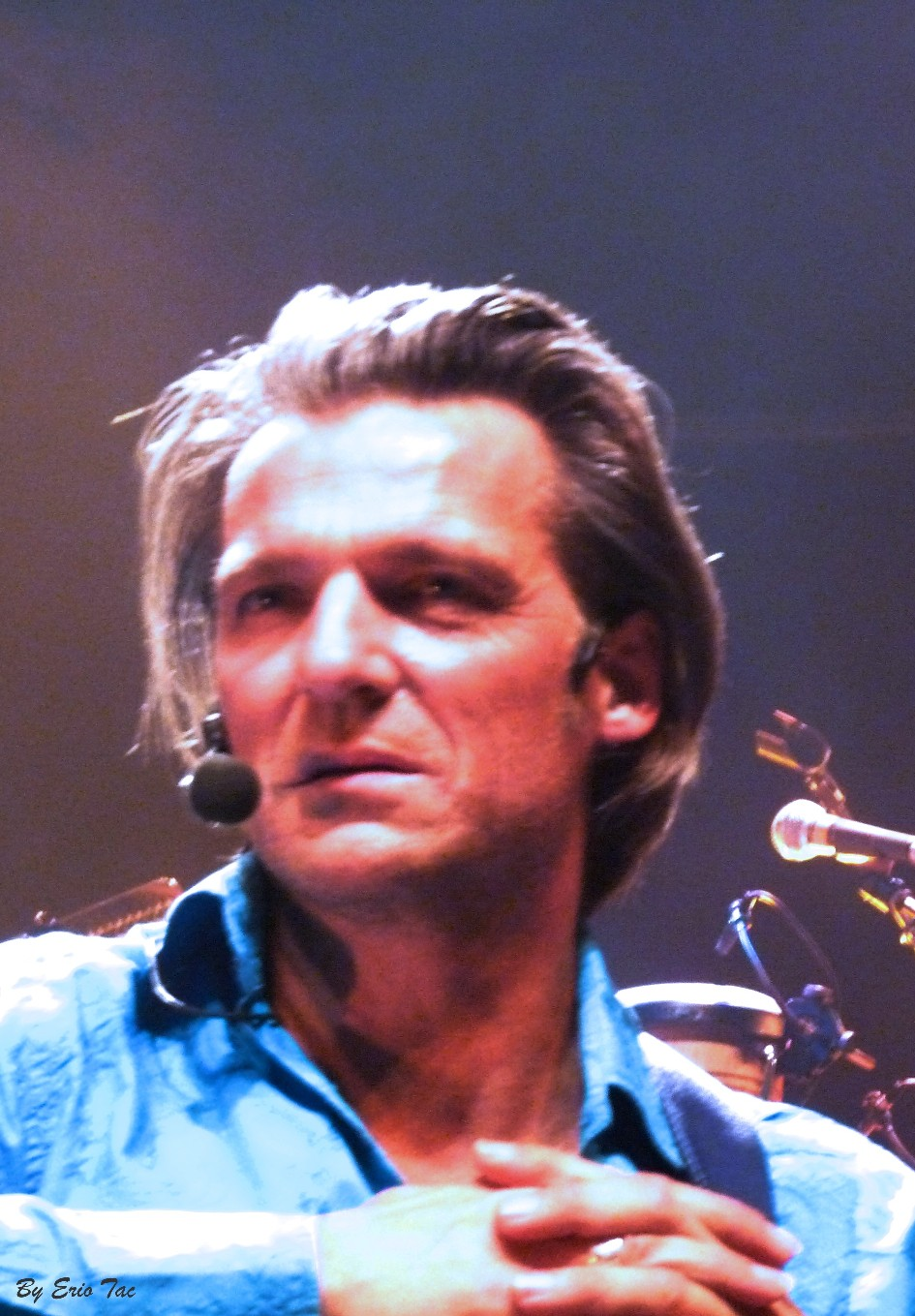 Yvan le bolloc'h en concert